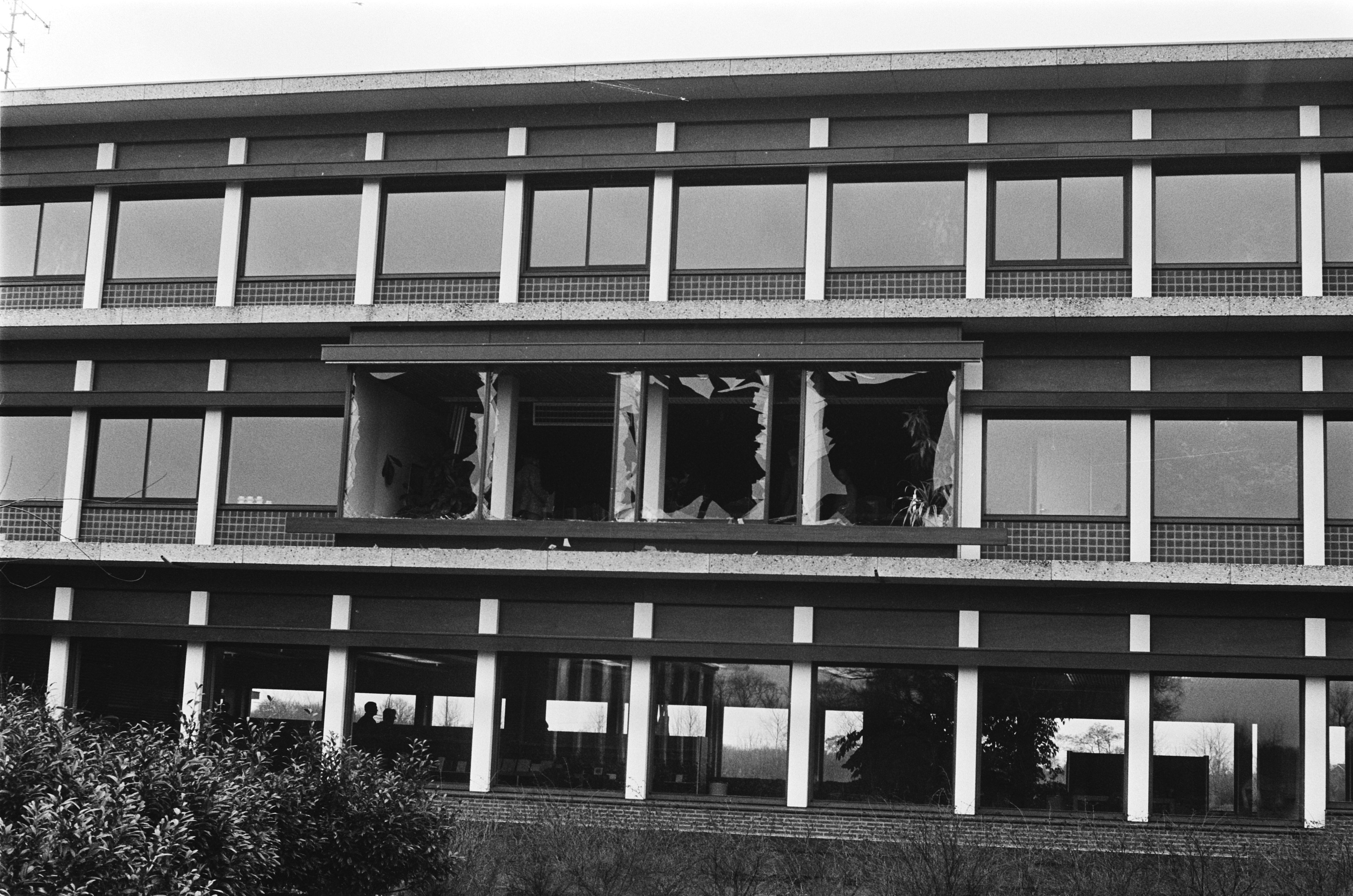 Assen, dag na de beeindiging van de gijzeling in het Provinciehuis: schade aan het Provinciehuis als gevolg van de bevrijdingsactie door de mariniers